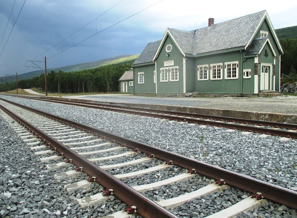 Vålåsjø stasjon på Dovrebanen